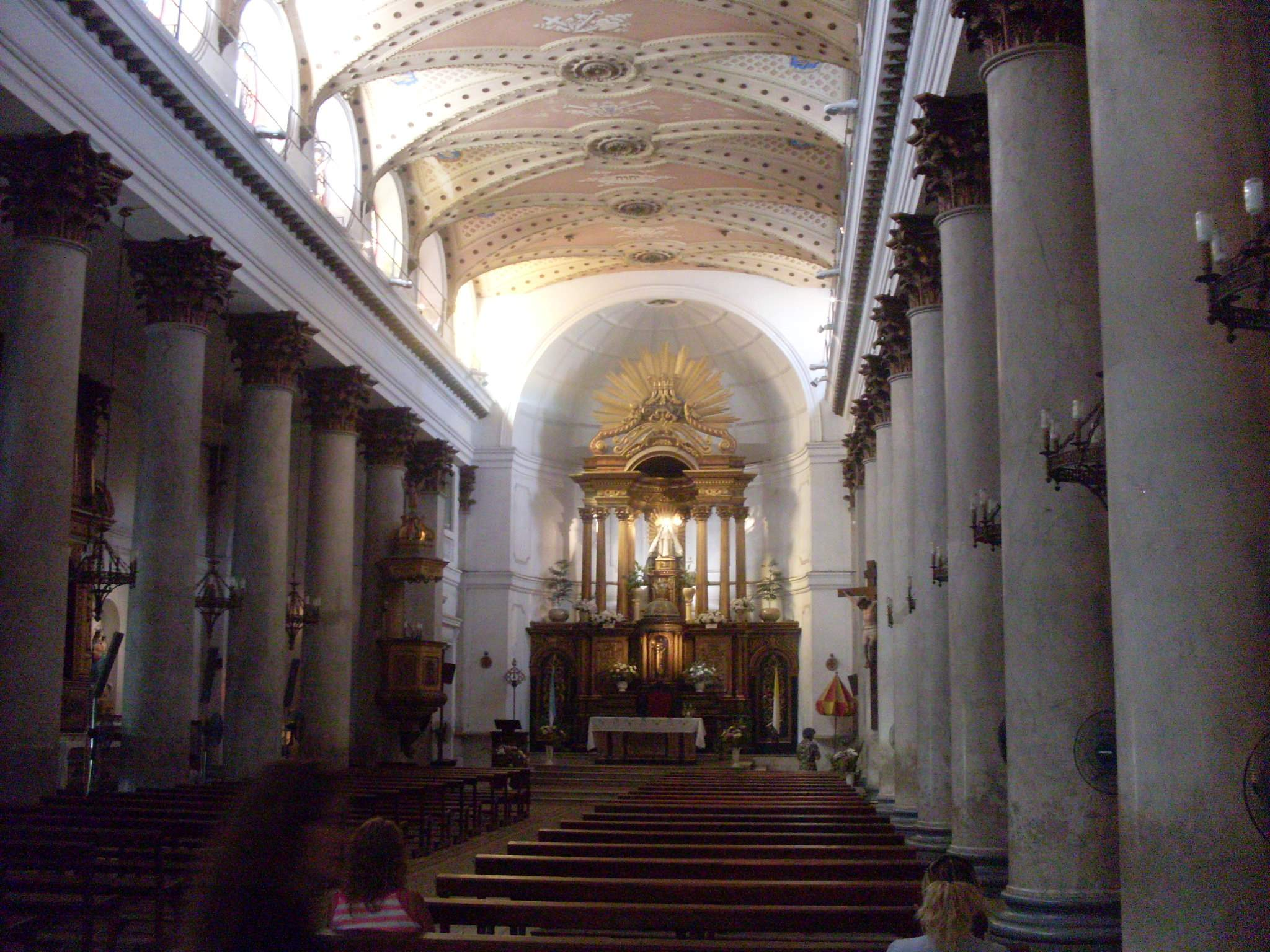 Catedral Basílica Inmaculada Concepción del Buen Viaje. Morón. Provincia de Buenos Aires. Argentina.